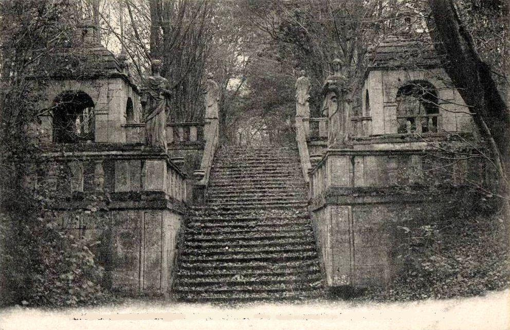 Le grand escalier au sud de l'allée du Mail, avec les deux gloriettes dessinées par Salomon de Brosse et les statues des quatre Vertus cardinales.